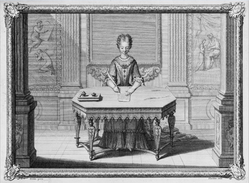 Louis Marchand, Nouveaux principes d'écriture italienne. Paris : J. Collombat, 1721. Gravure de Tardieu sur un dessin de Bertin (Paris BNF).